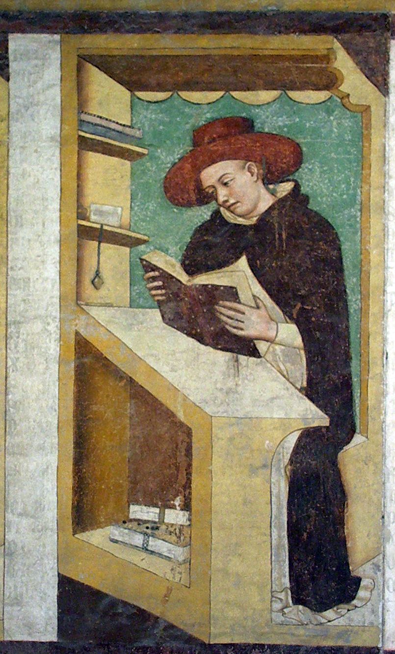 Nicolò Boccasino, serie dei Quaranta domenicani illustri, ex convento di San Niccolò, Sala del Capitolo, Treviso, 1352 (altezza di ciascun ritratto 150 cm circa)